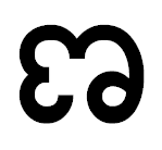 накараму